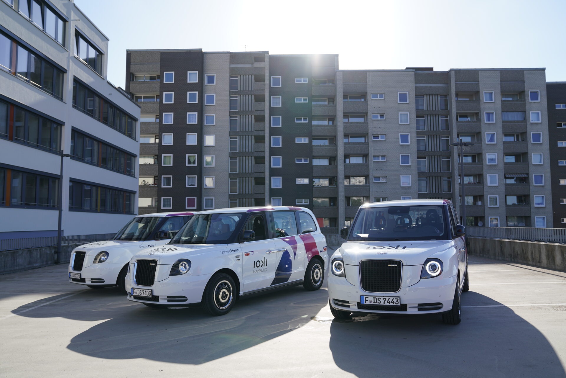 3 LEVCs aus der ioki Hamburg Flotte